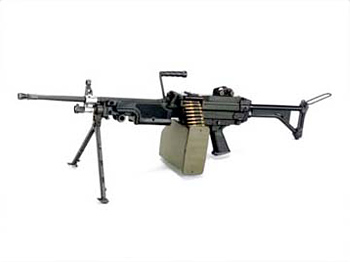 略称：MINIMI 愛称：ミニミ [口径]5.56mm [全長]約1,040mm [重量]7.01kg [給弾方式]弾倉、ベルト [製作]住友重機械工業 軽量コンパクトな構造であり、携行が容易になっている。発射速度は標準（750発/分）、最大（1,000発/分）の2段階切り替えができる。給弾はリングベルト給弾及び専用の箱型弾倉（200発入り）による給弾のほか、小銃用弾倉（30発入り）が装着できる。下部被筒の下面に収容可能な2脚を展開し射撃可能なほか、アダプタを介した三脚架射撃が可能である。